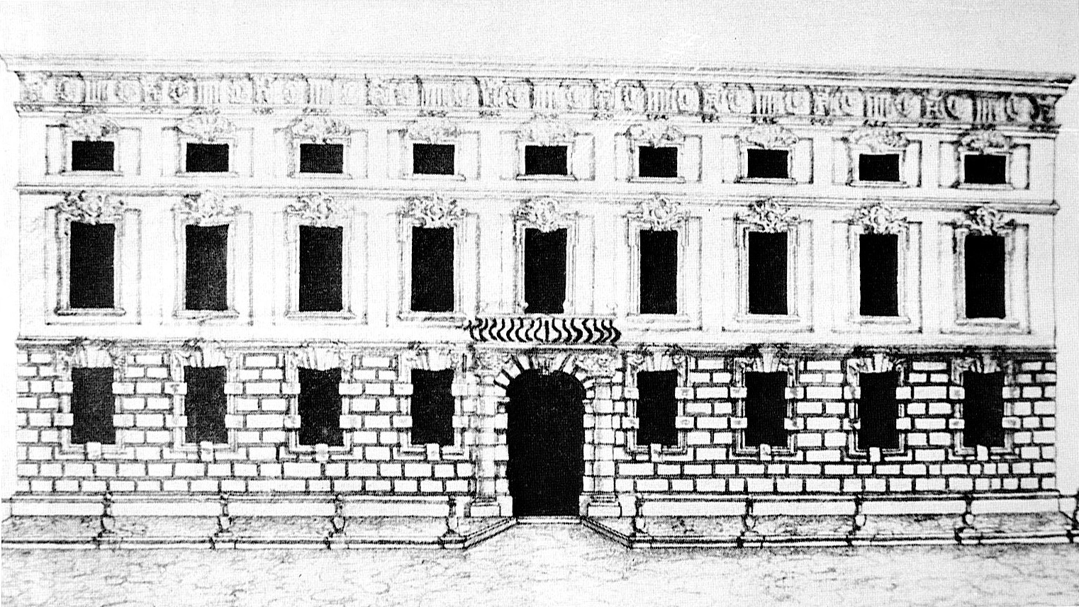 Fassadenaufriss des Innsbrucker Palais Fugger-Taxis